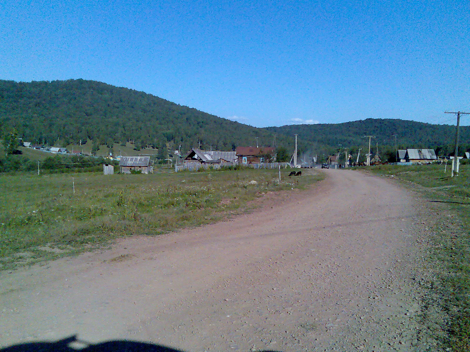 Новосаитово